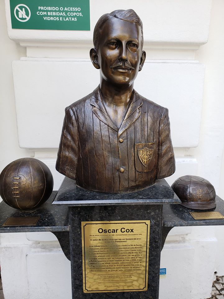 Busto de Oscar Cox, principal fundador do Fluminense Football Club